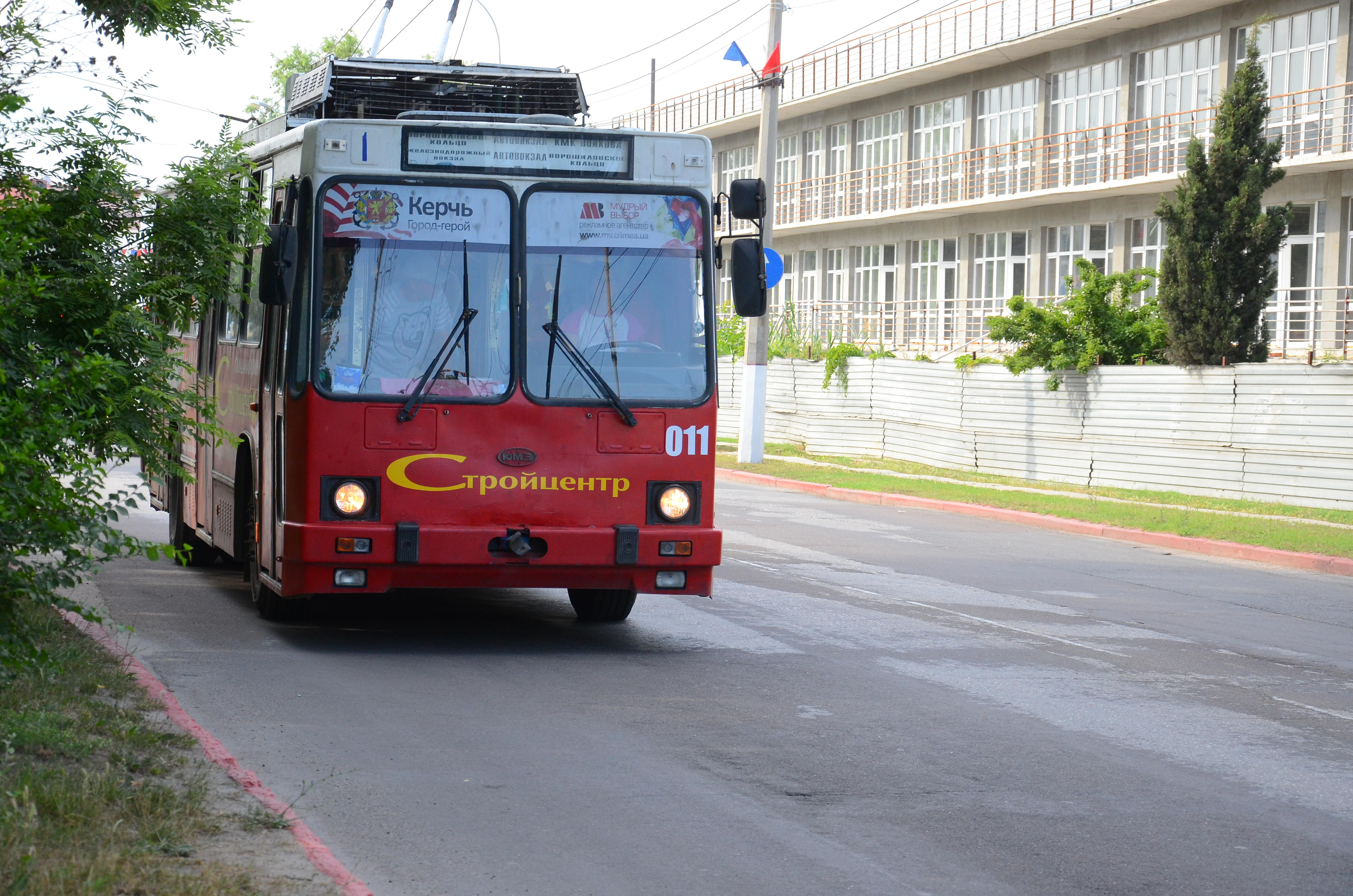 Керчь